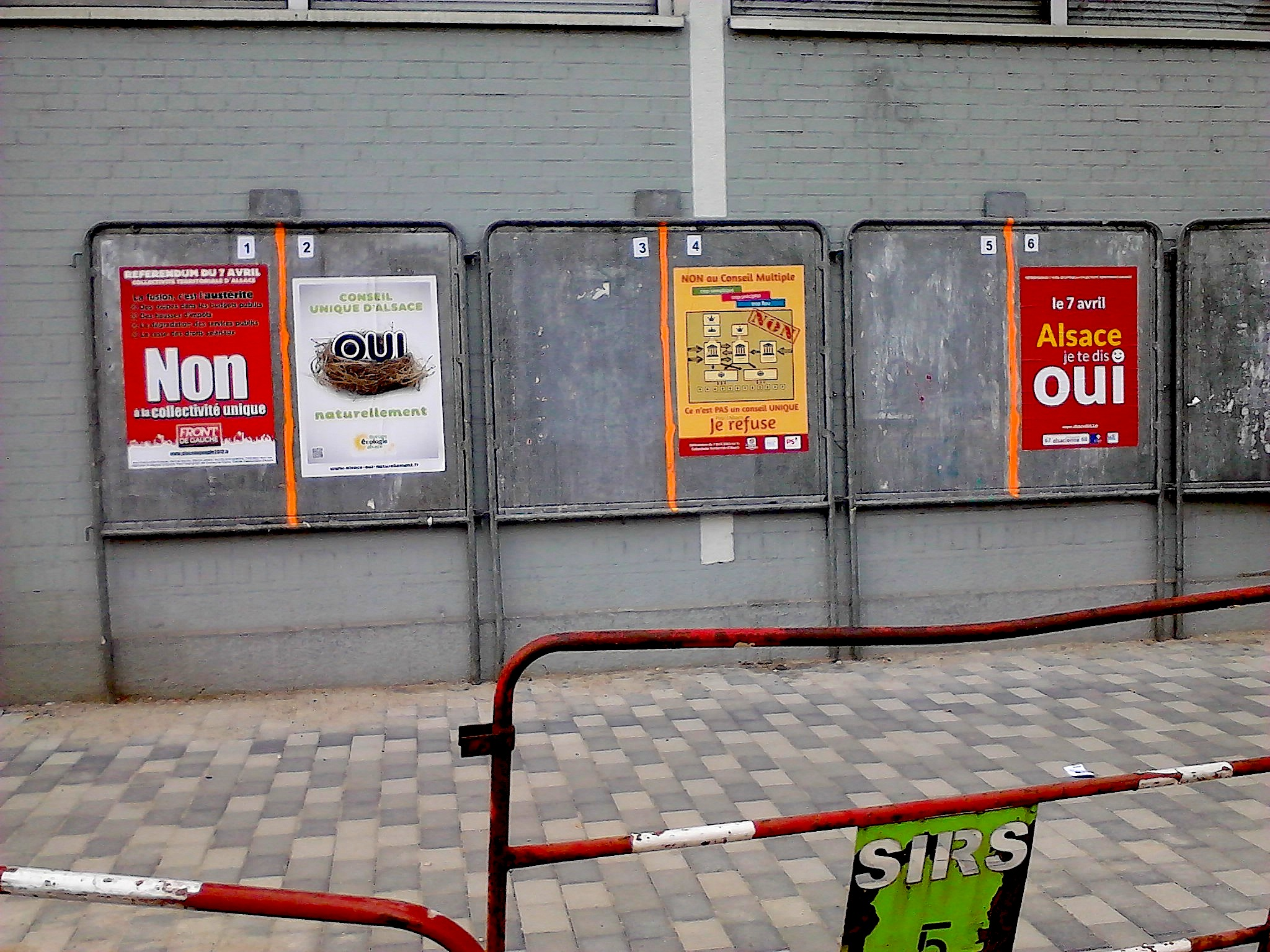 Affiches pour le référendum concernant la Collectivité territoriale d'Alsace